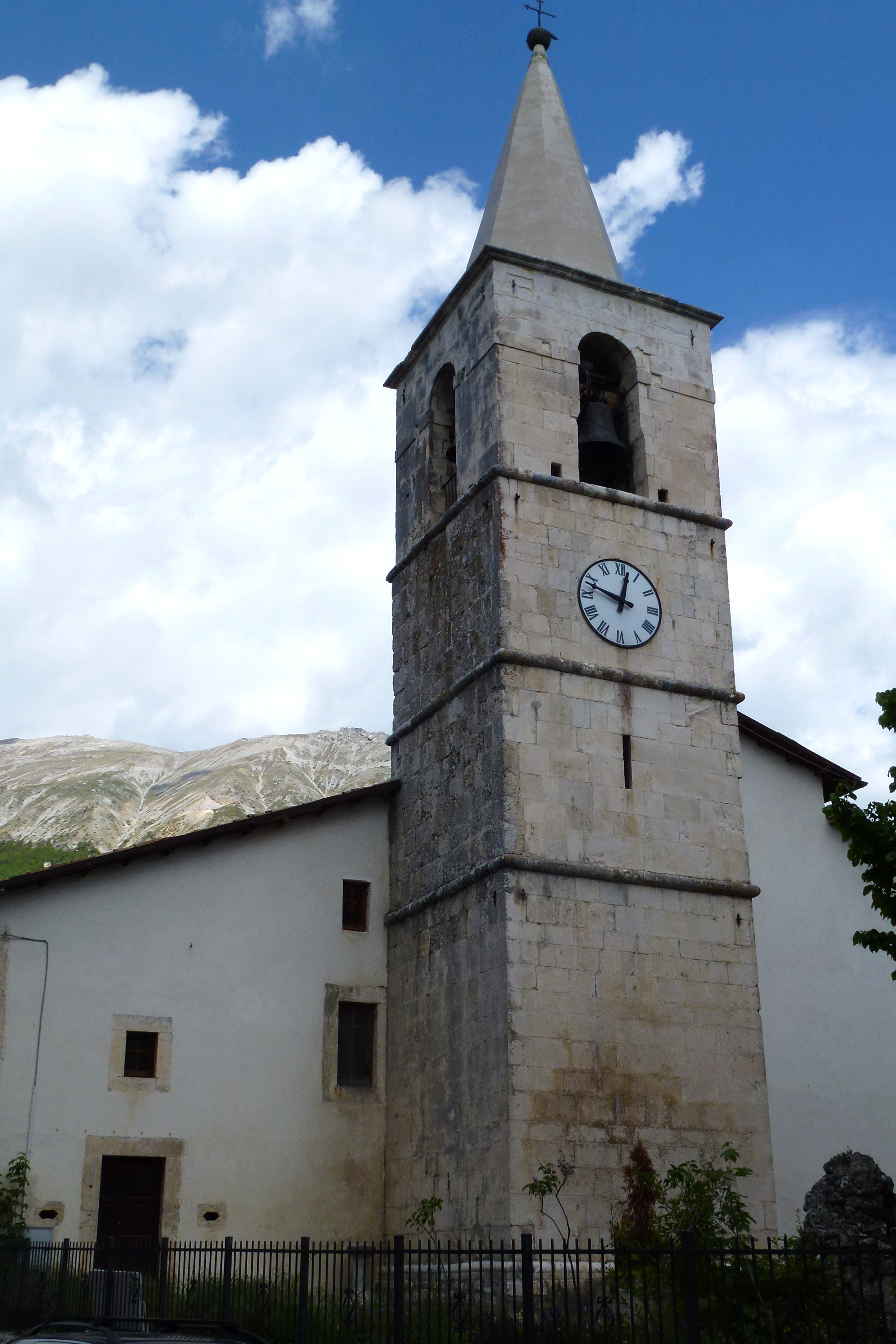 Chiesa di Campo di Giove